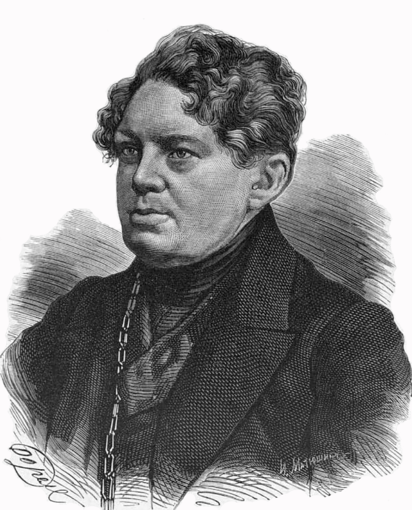 Муравьёв Андрей Николаевич, духовный писатель и историк церкви, паломник и путешественник; драматург, поэт